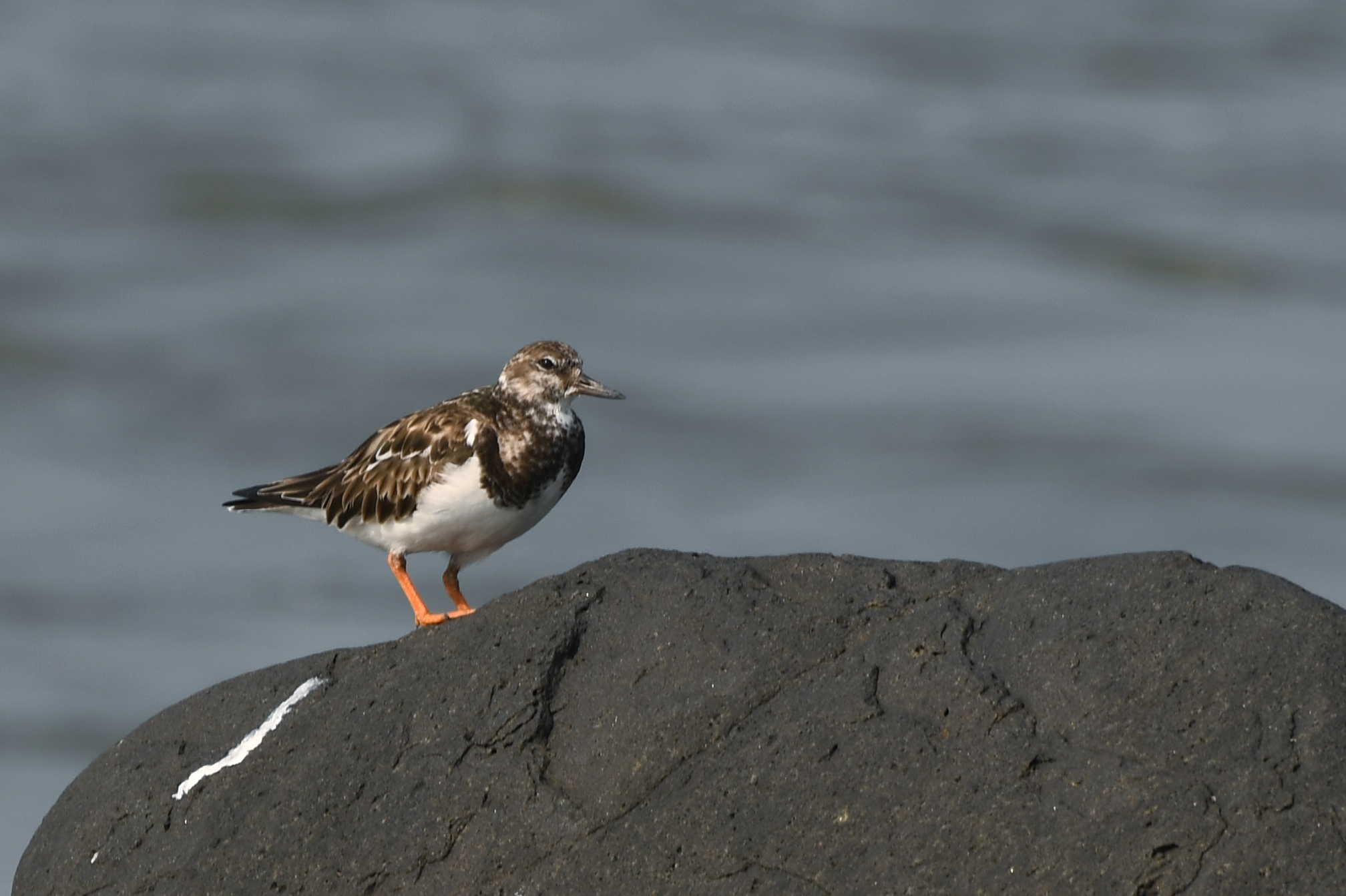 വടക്കേ അമേരിക്ക, യൂറോപ്പ്, ഏഷ്യാ പസഫിക്ക് തുടങ്ങി ലോകമാകമാനം കാണപ്പെടുന്ന ഈ പക്ഷി ഉയർന്ന ദേശാടന സ്വഭാവം പുലർത്തുന്നവയാണ്. ശിശിരകാലത്ത് തെക്കൻ തീരത്തേക്ക് കൂട്ടത്തോടെ പറക്കുന്ന ഇവ ശൈത്യം തീരുന്നതോടെ തിരികെ പോകാറുണ്ട്.